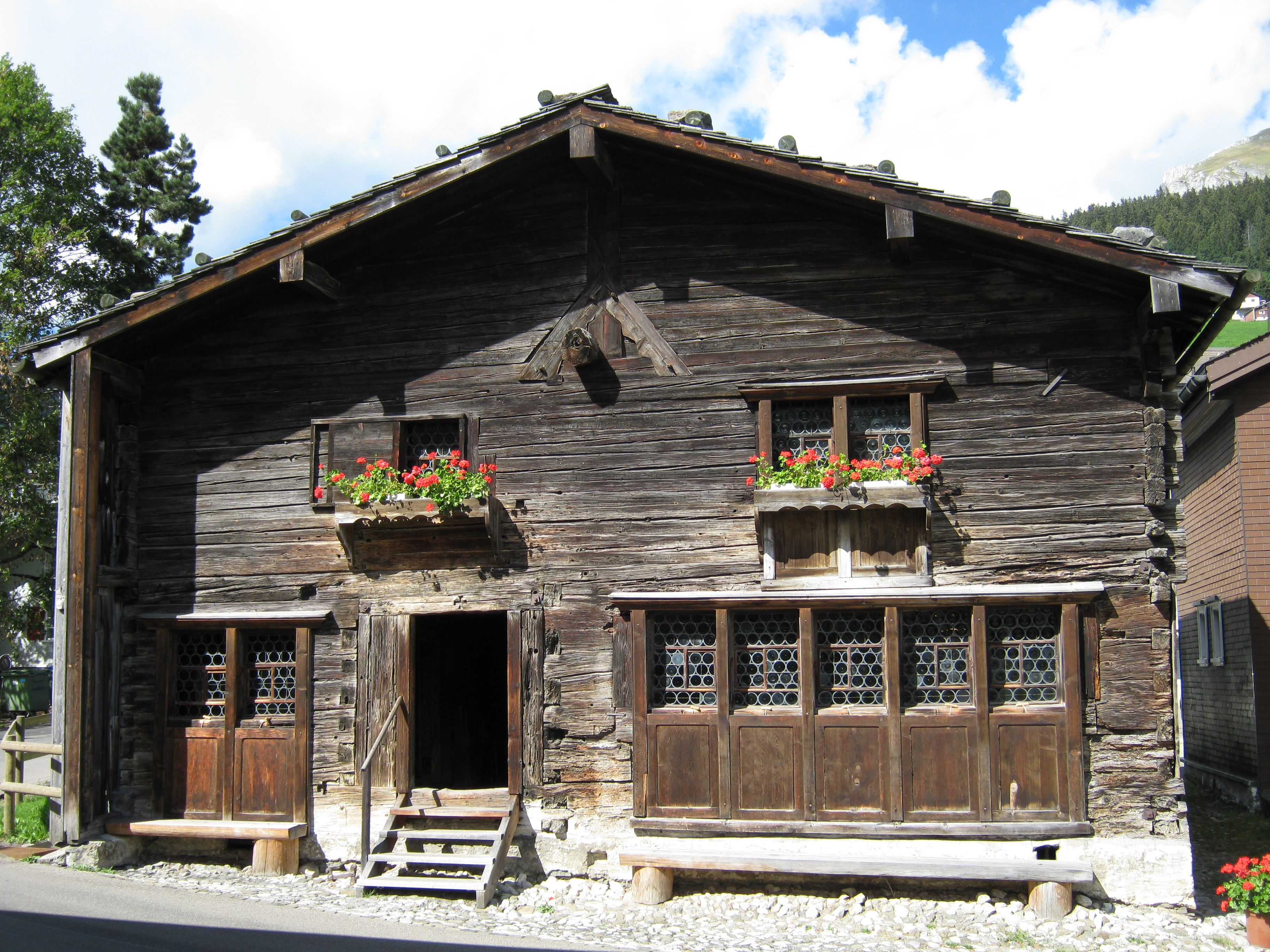 Geburtshaus von Ulrich Zwingli in Wildhaus